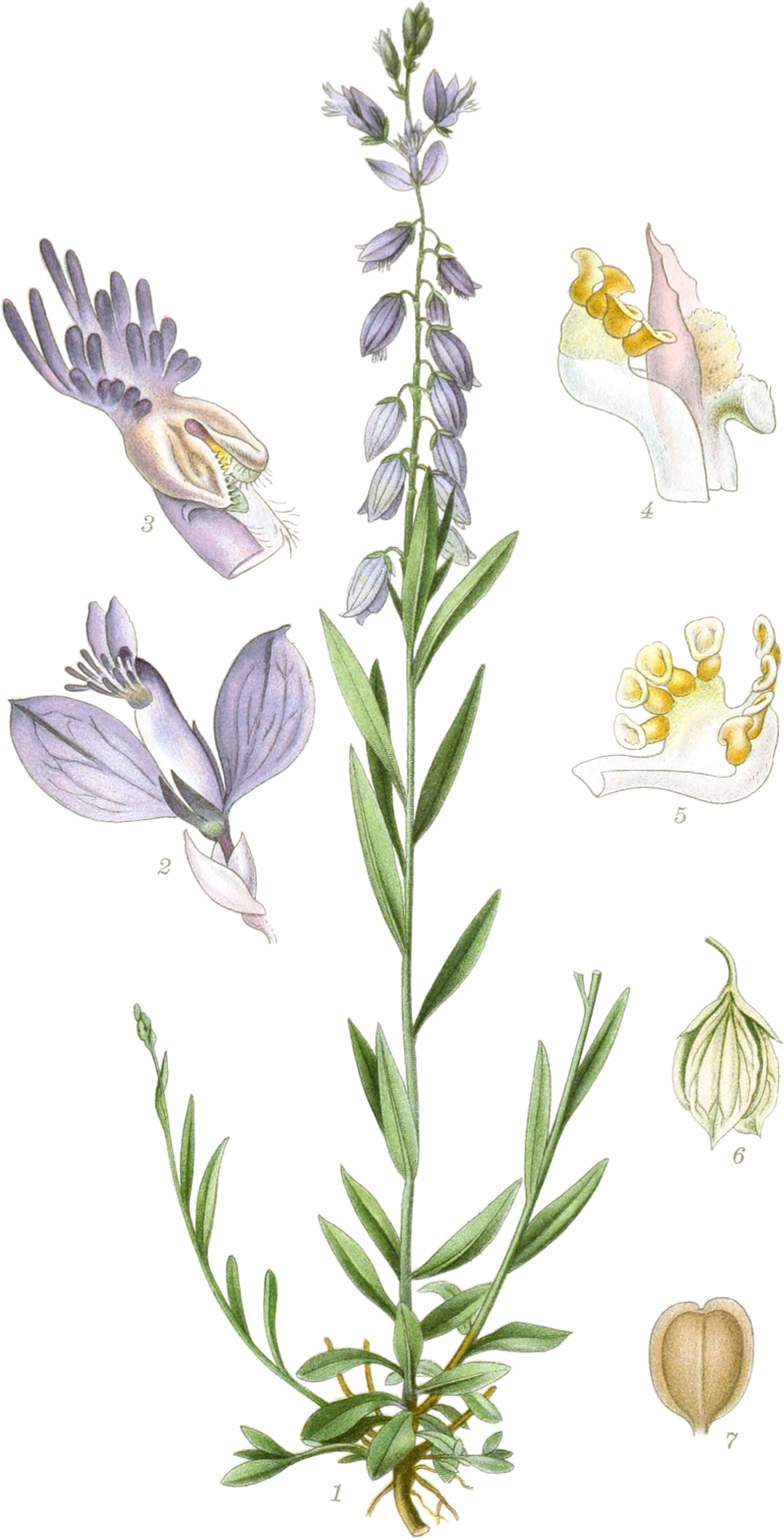 Mentz, A.; Ostenfeld, C. H.: Bilder der Nordflora. Band 1, 1917ff.Gewöhnliche Kreuzblume. Polygala vulgarisTaf. 222. Abb. 1. Einzelne, von denen mehrere Schösslinge abgeschnitten sind. Abb. 2. Blüte an der Basis von 3 hohen Blättern (3/1). Abb. 3. Der Kiel und die darin enthaltenen Blättchen der Fortpflanzung (12/1). Abb. 4. Staubblatt-Rohr mitsamt der Stempel; Zwischen den ?Arlapperne? liegt eine Staubmasse (28/1); Die Ansicht ist wie in Abb. 3. Abb. 5. Blick von der Innenseite des Staubblattbündels (28/1). Fig. 6. Die Frucht, umgeben von den beiden Kelchblättern (2/1). Fig. 7. Reife Früchte (2/1).